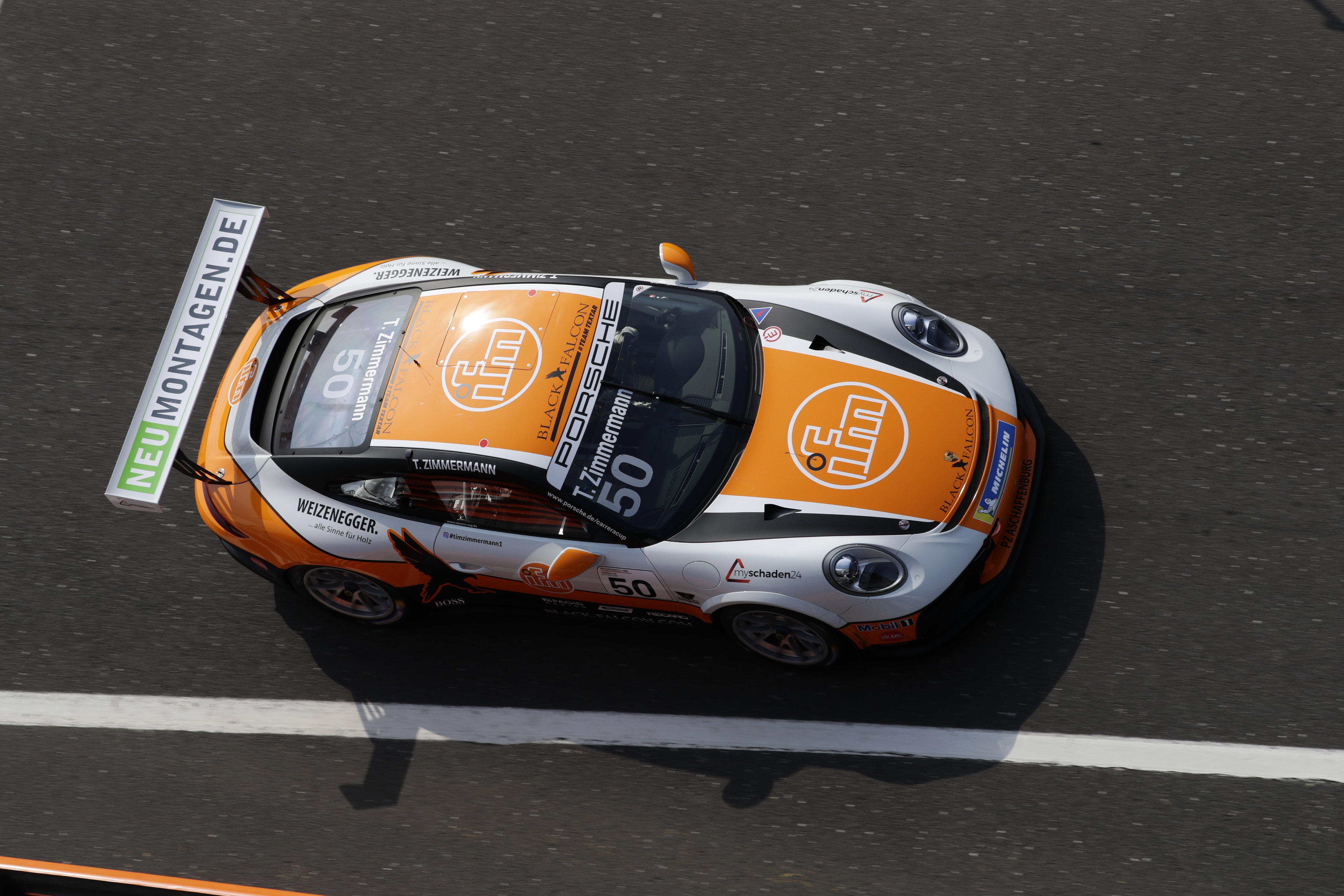 Tim Zimmermann mit seinem Porsche 911 2019 bei Testfahrten im tschechischen Most